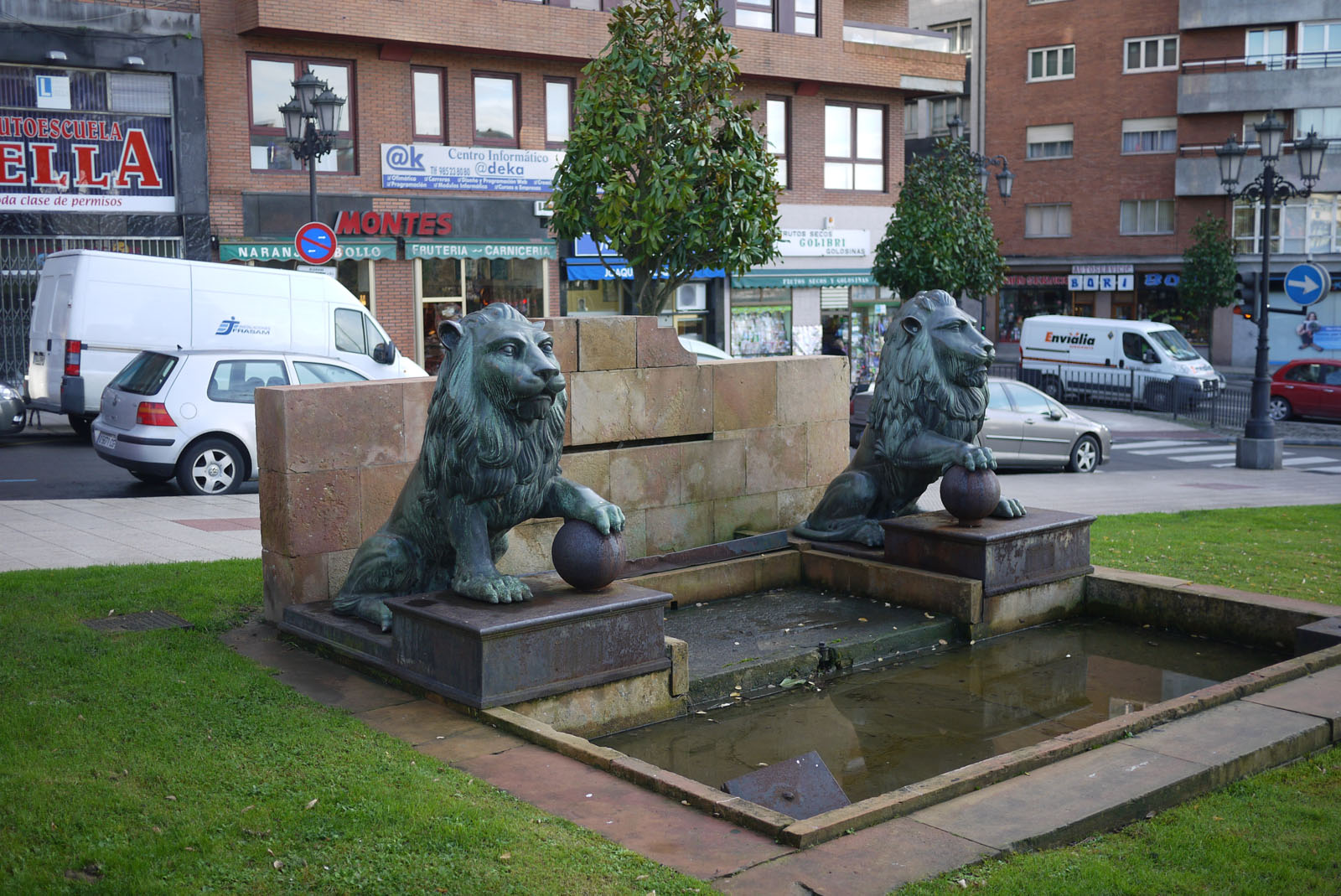 Oviedo